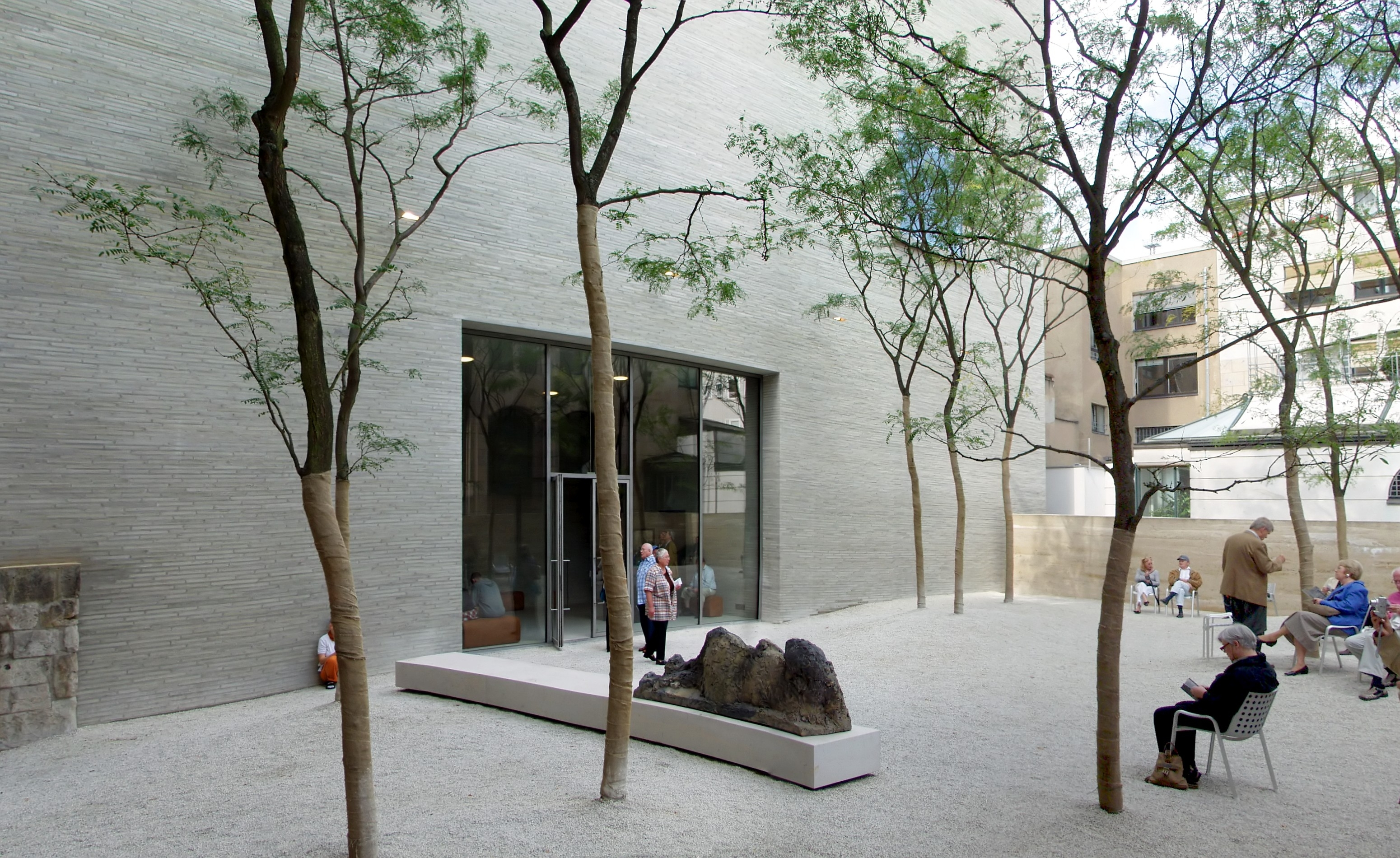 Innenhof vom Kolumba (Museum), Köln.